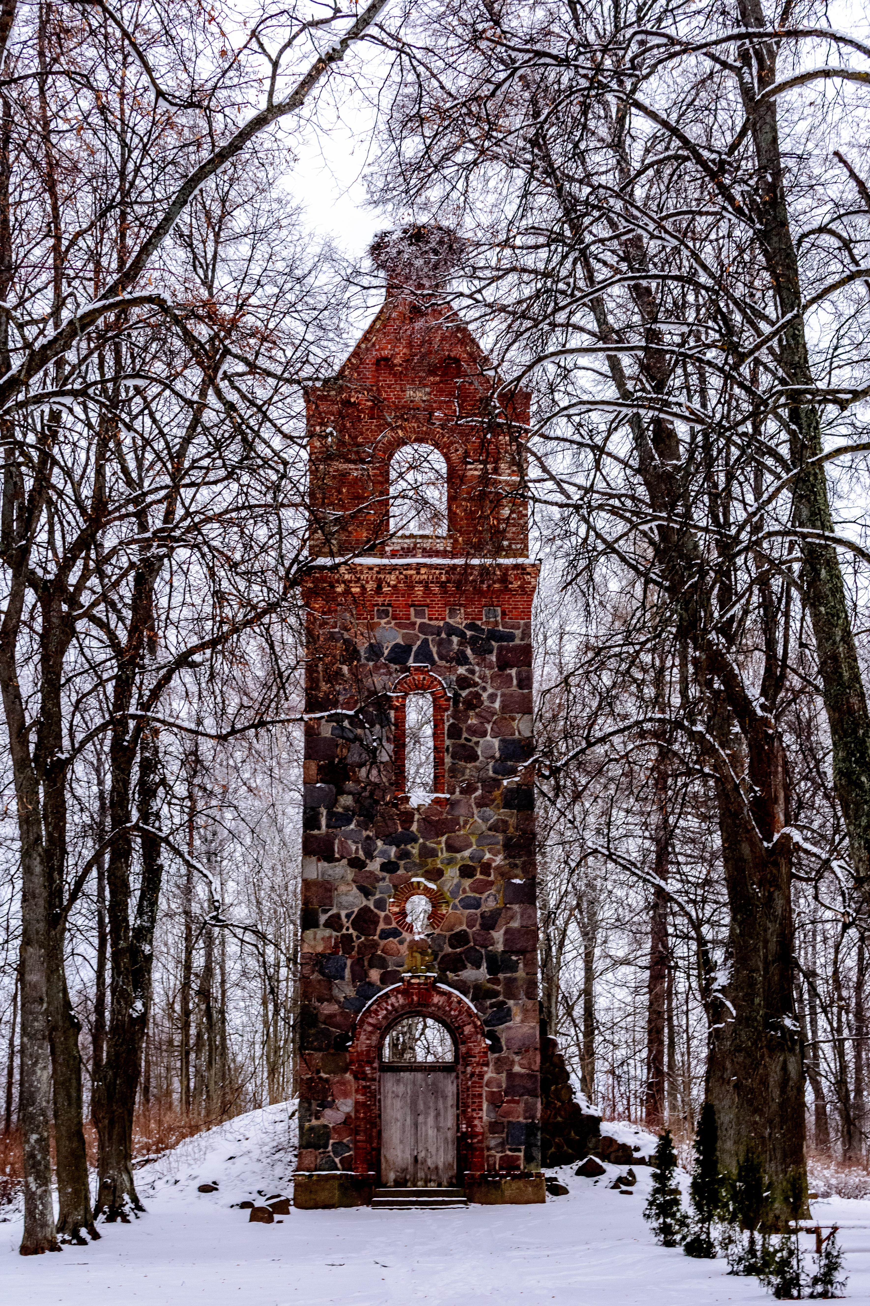 Mehikoorma lut. kiriku varemed